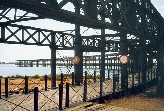 Muelle del Tinto. Huelva. España.